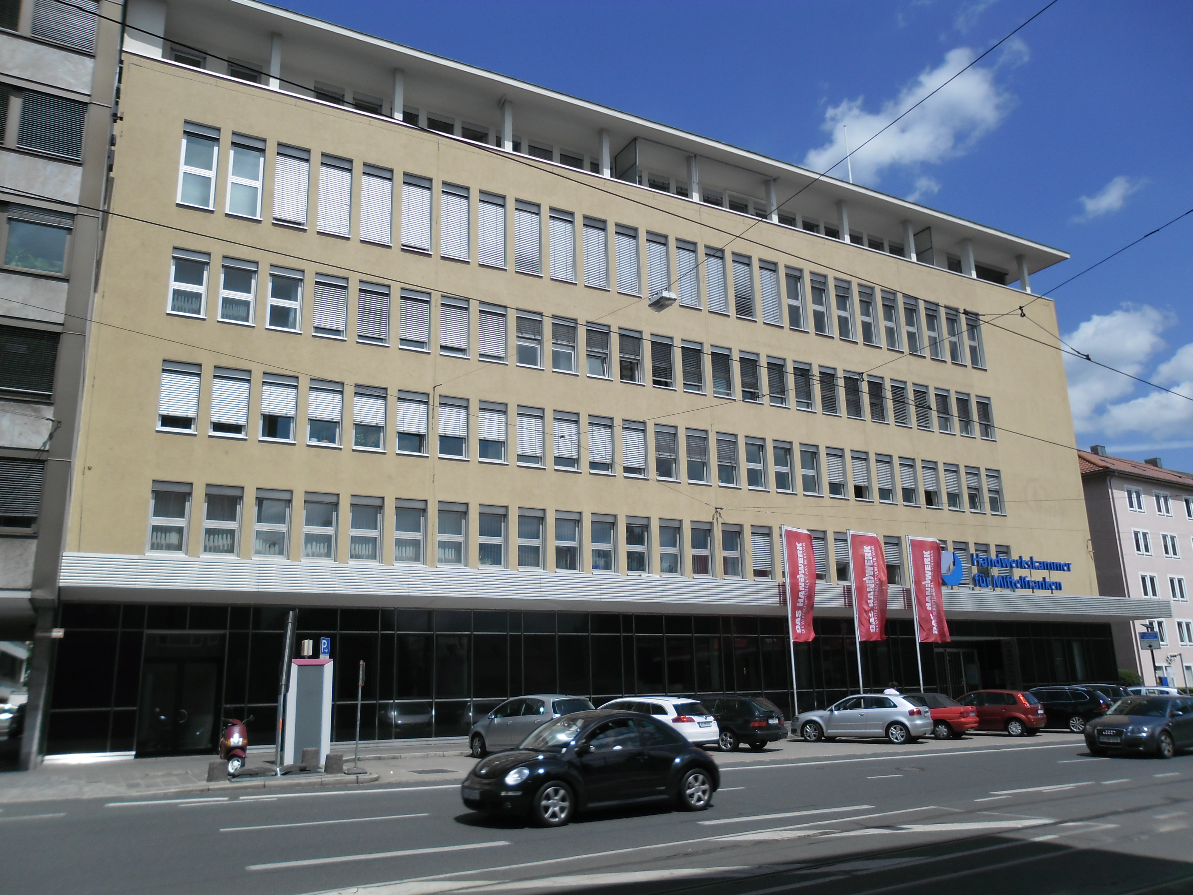 Gebäude der Handwerkskammer für Mittelfranken an der Sulzbacher Straße 11 bis 15